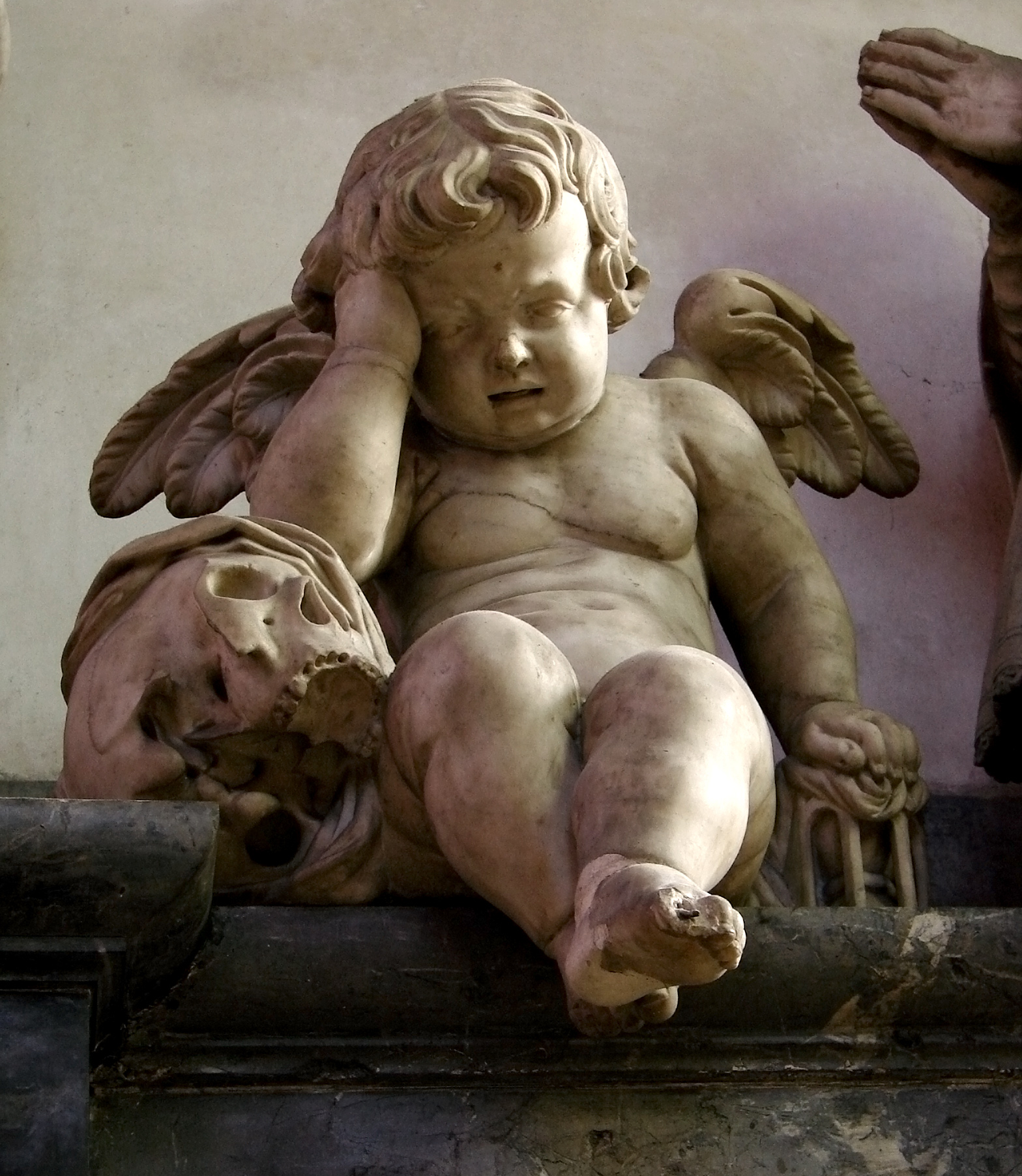 "L'Ange pleureur", sculpté par Nicolas Blasset, (1628); cette statue fait partie du tombeau du chanoine Lucas, 1ère moitié du 17ème siècle, au revers du maître-autel de la cathédrale d'Amiens.